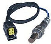 Automobile oxygen sensor